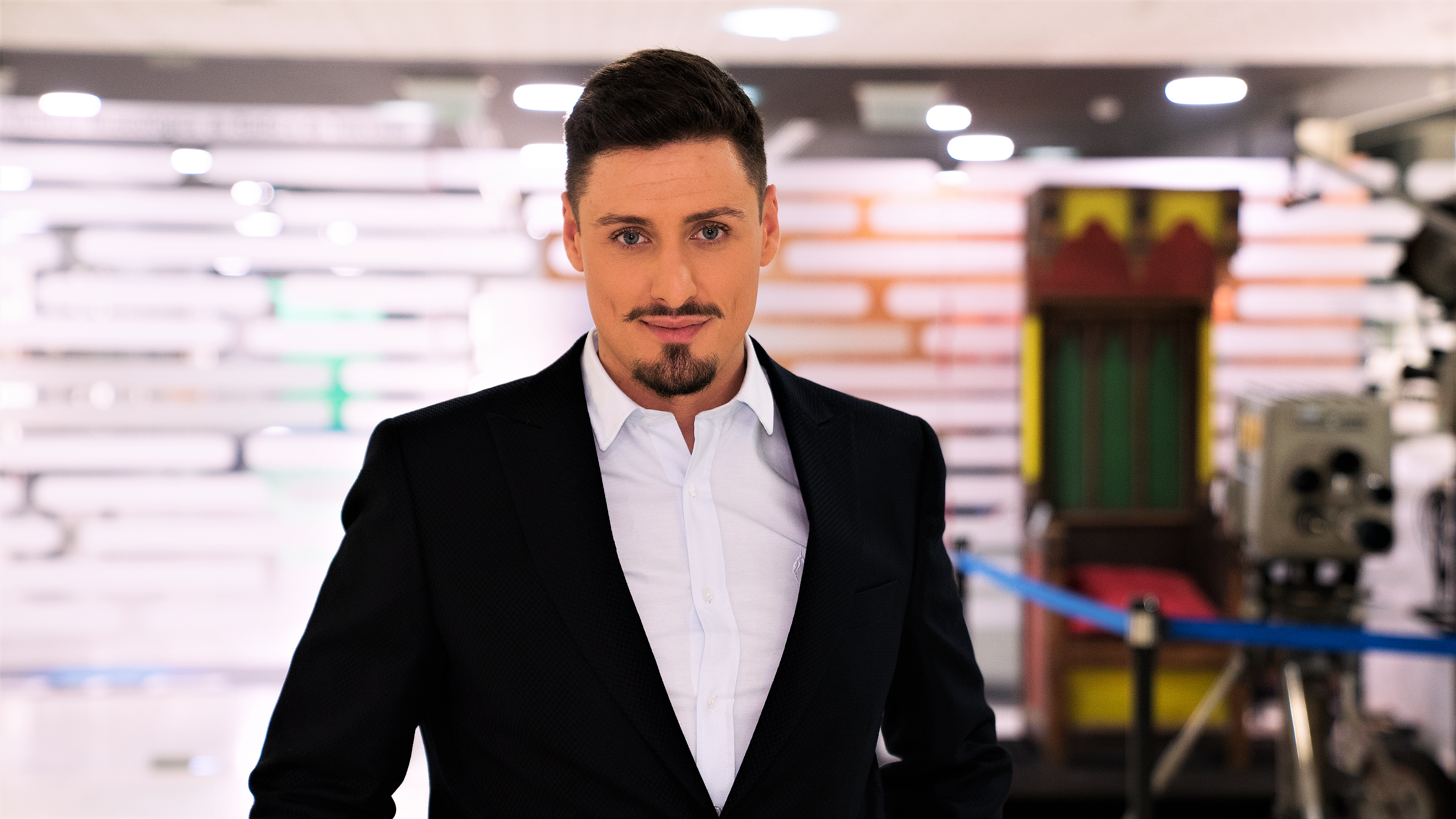 David Dias, apesentador da RTP